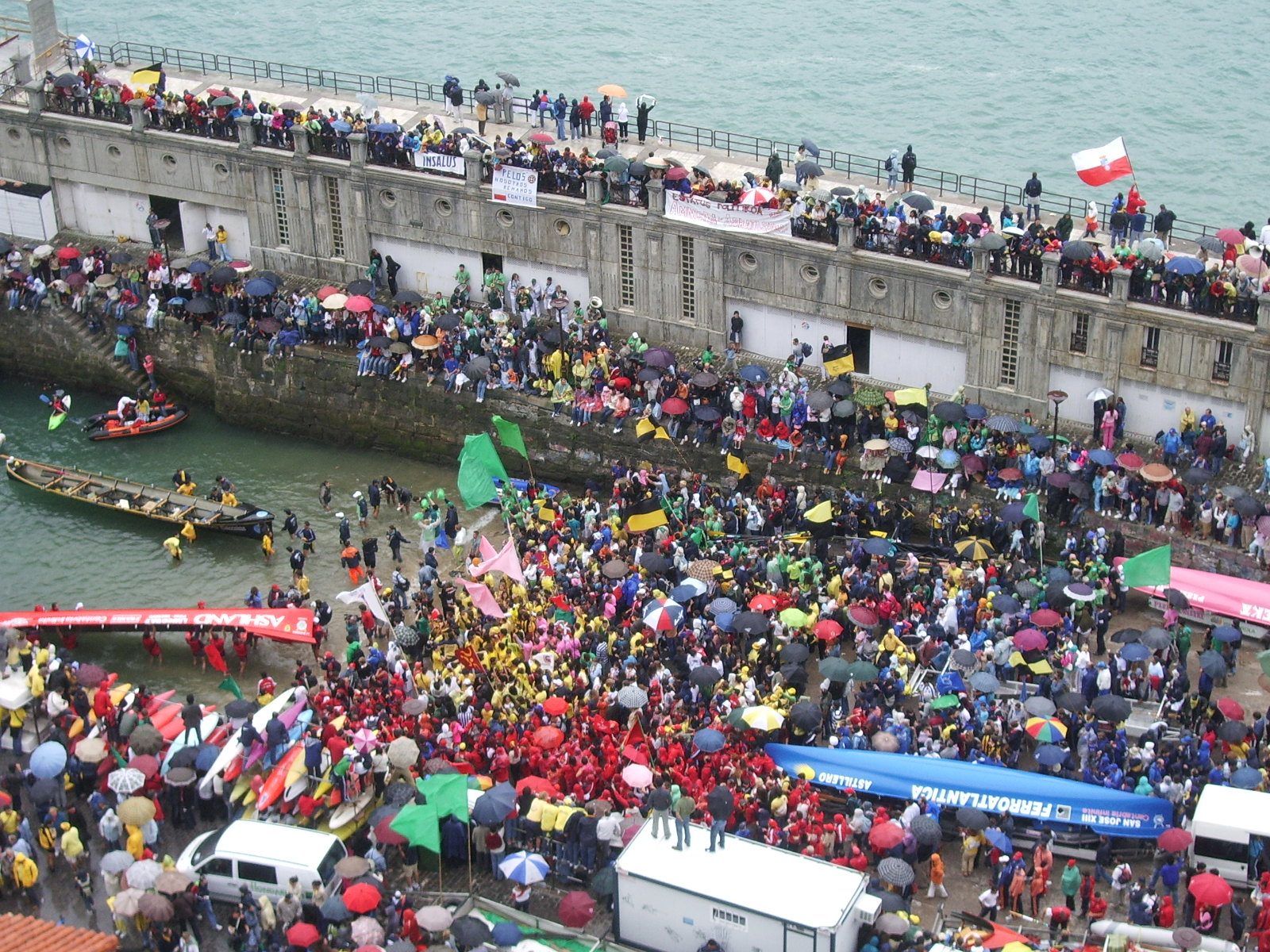 Donostiako 2005eko Estropadetako irabazleei harrera portuko aldapa handian, Kaiarripe. Nik neuk egina